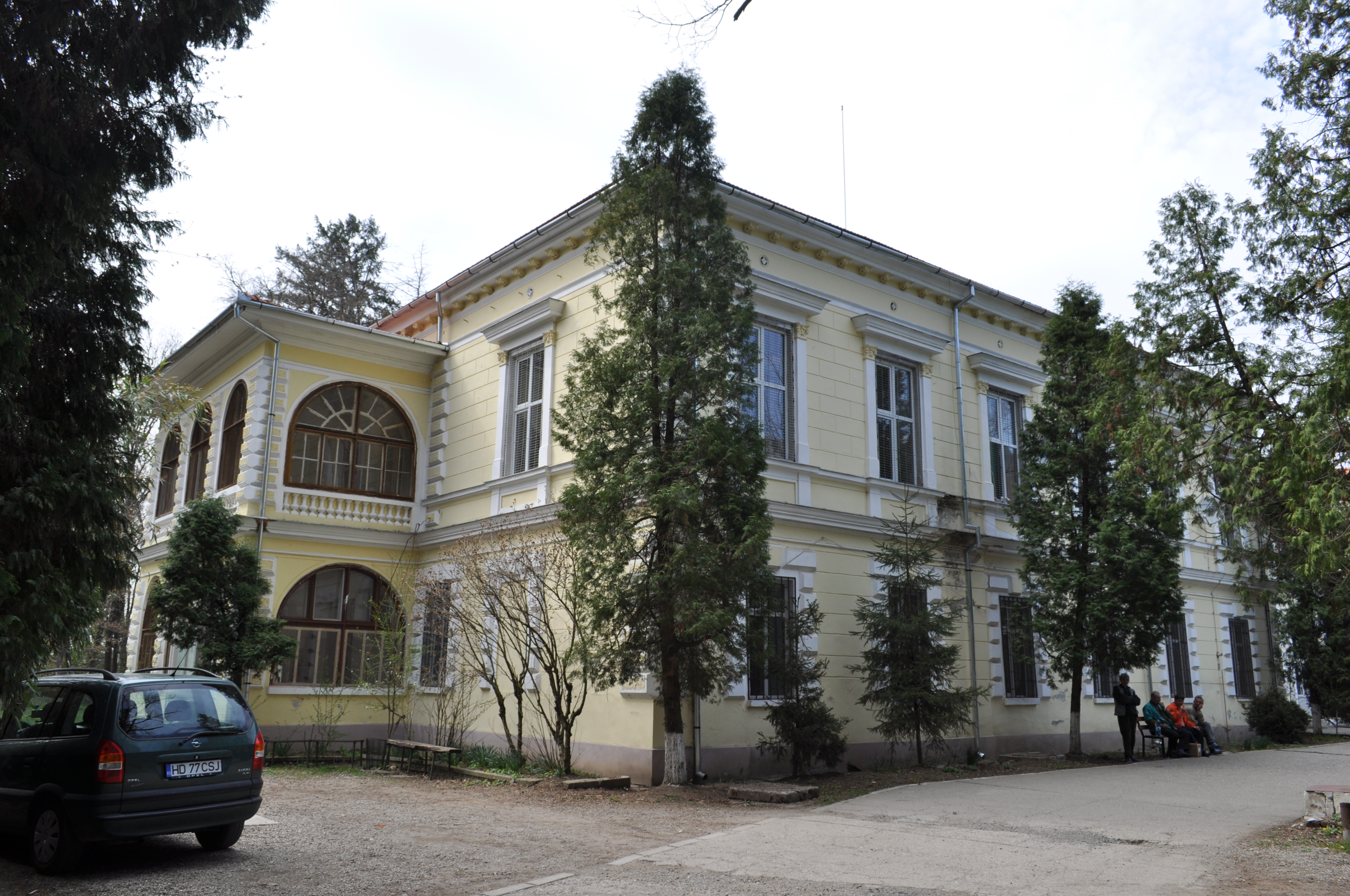 Castelul Nopcsa 01